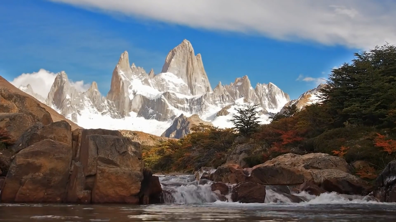 Cº Fitz Roy, Chaltén - Argentina